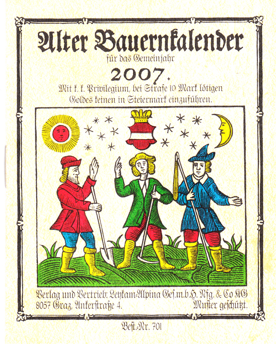 Titelblatt des Mandlkalenders 2007 (Alter Bauernkalender 2007)